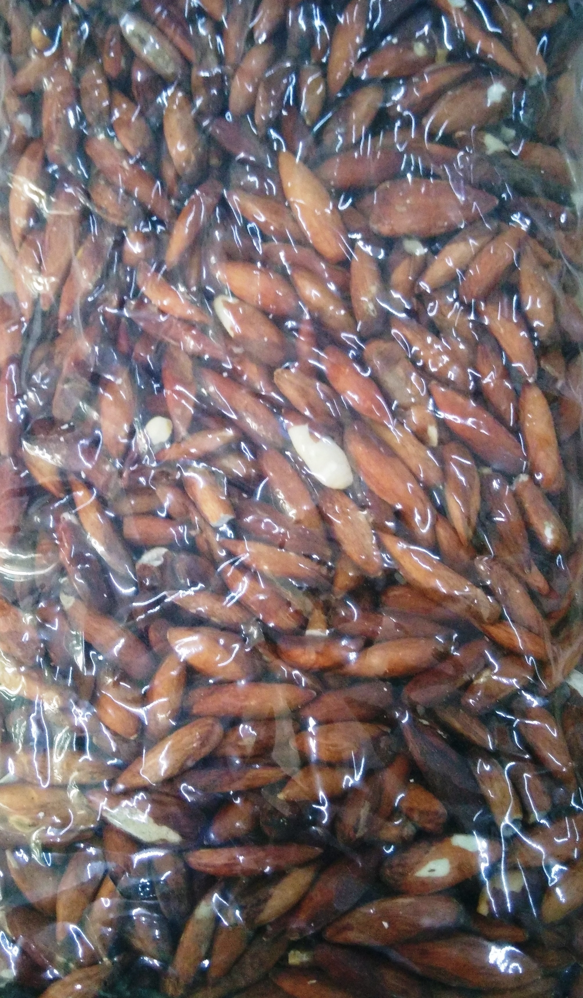 Mút hạt bàng ở Côn Đảo (hàng xách tay)